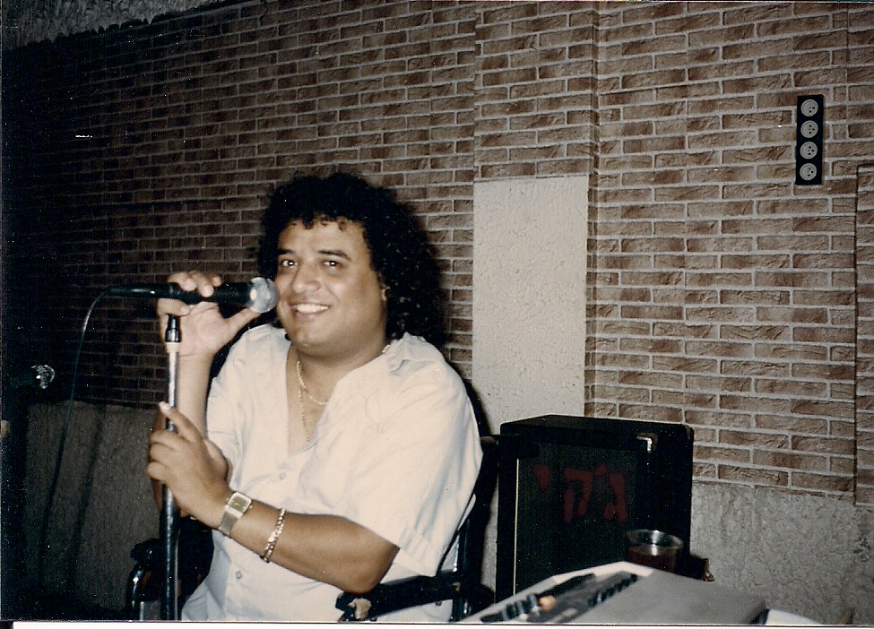 הזמר ג'קי מקייטן